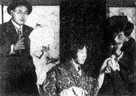 『引越し夫婦』、1928年、スチル写真